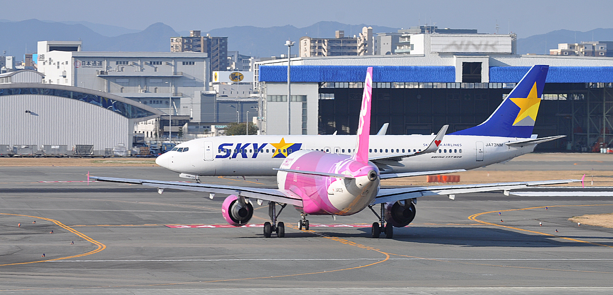 誘導路上で離陸を待機する旅客機。福岡空港にて撮影。